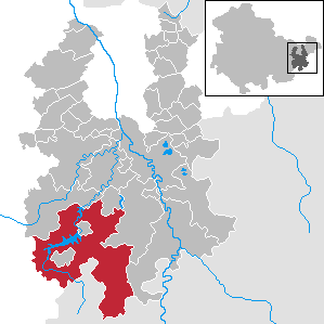 Zeulenroda-Triebes in Thuringia - District Greiz